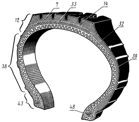 Элементы покрышки пневматической шины по ГОСТ 22374-77 7 — протектор 12 — плечевая зона 14 — подканавочный слой 32 — каркас 33 — брекер 38 — боковина 39 — резина боковины 43 — борт 48 — бортовое кольцо